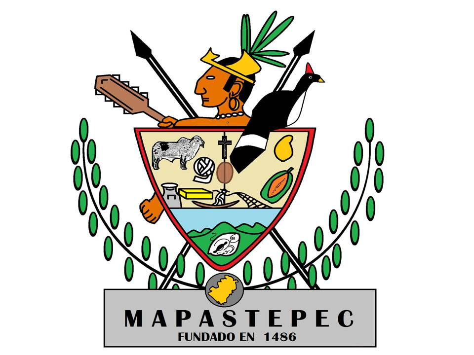 SIGNIFICA CERRO DEL MAPACHE EVELIO AGUILAR FIGUEROA ES EL CREADOR DE ESTE ESCUDO